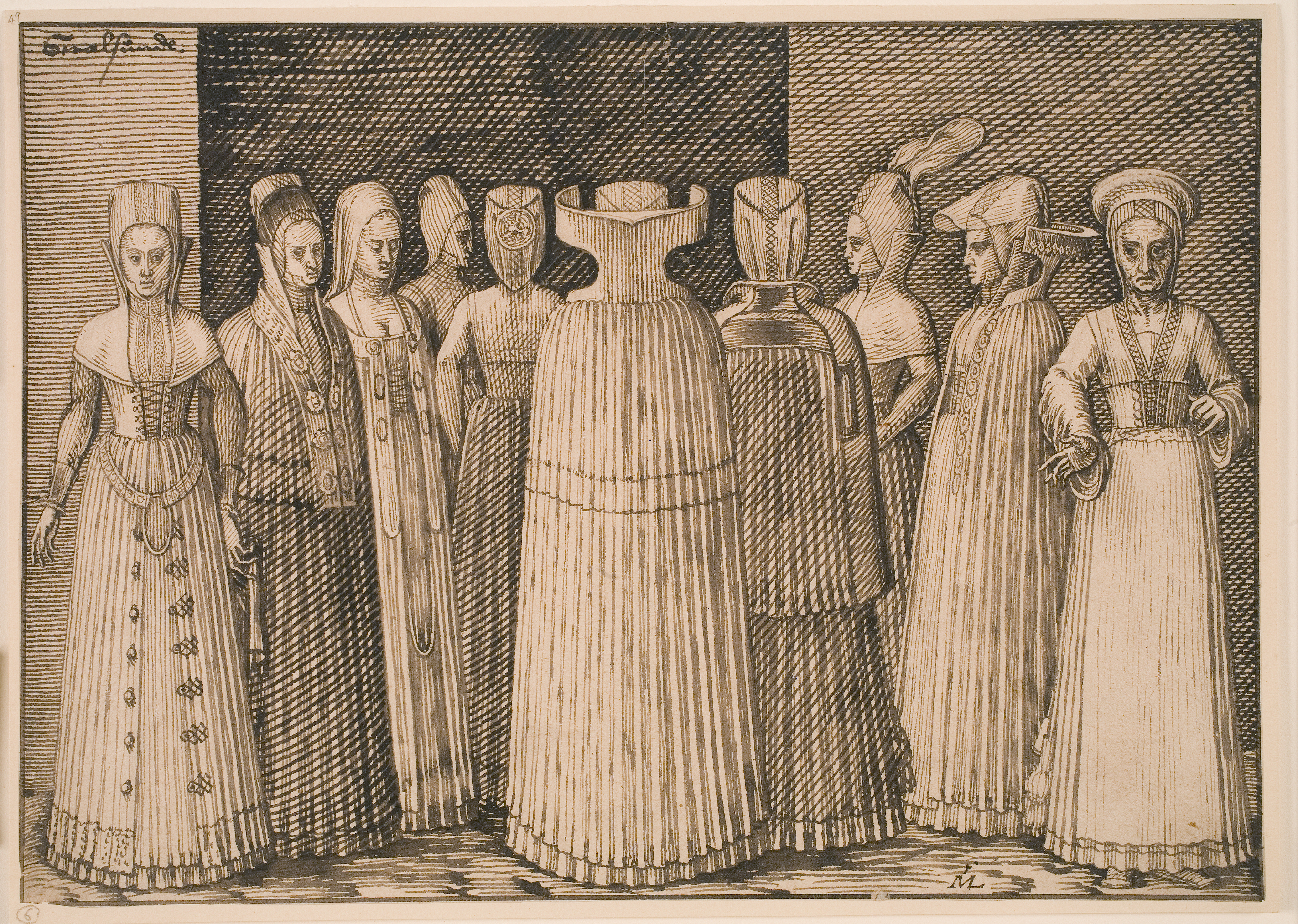 Pen, brunt blæk